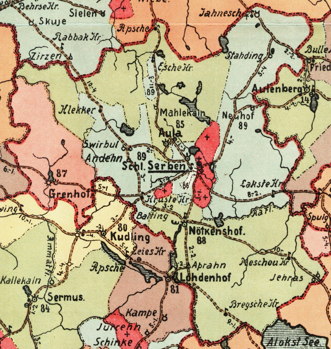 Dzērbene kihelkonna mõisad 1903. aasta kaardil.